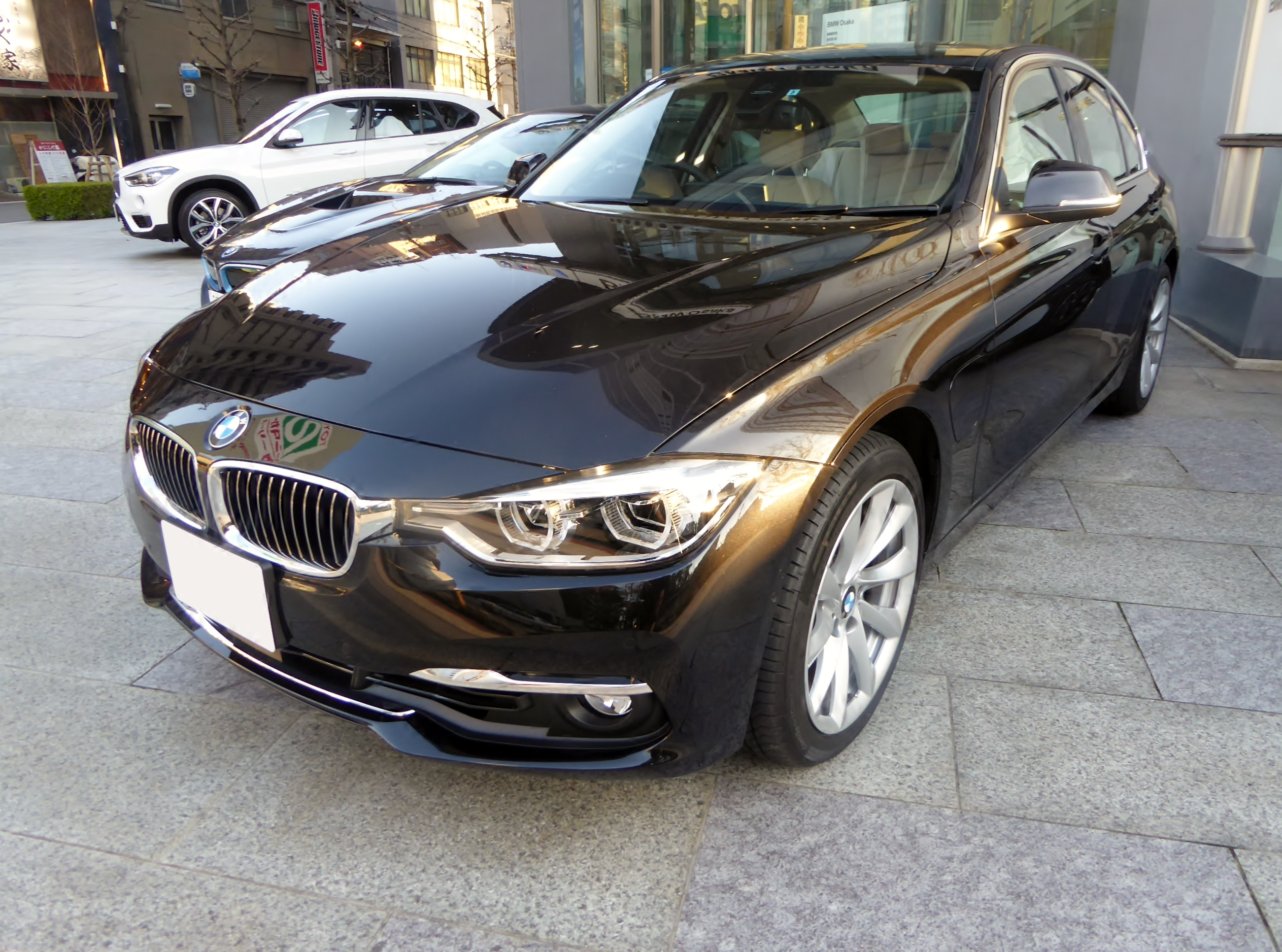 F30型BMW・330eをフロントから撮影。